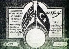 İngiliz Muhipleri Cemiyeti üyelerinin kullandığı kimlik kartı